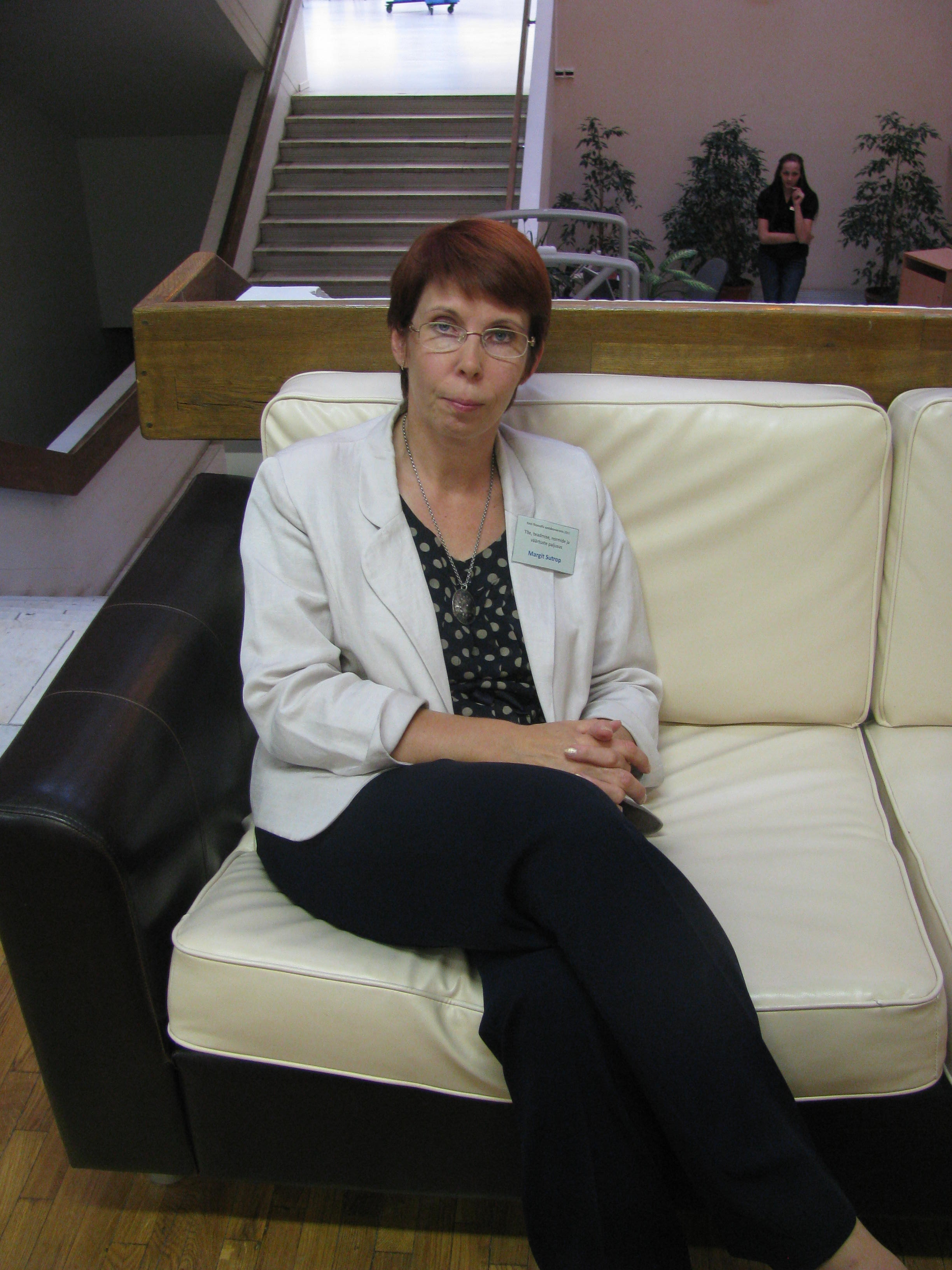 Margit Sutrop Eesti filosoofia 7. aastakonverentsil Tartus